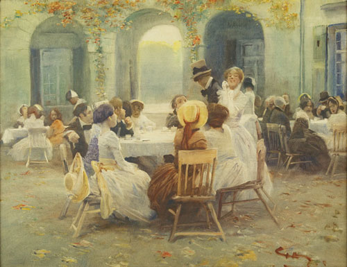 Künstlervereinigung „Malkasten“, Düsseldorf